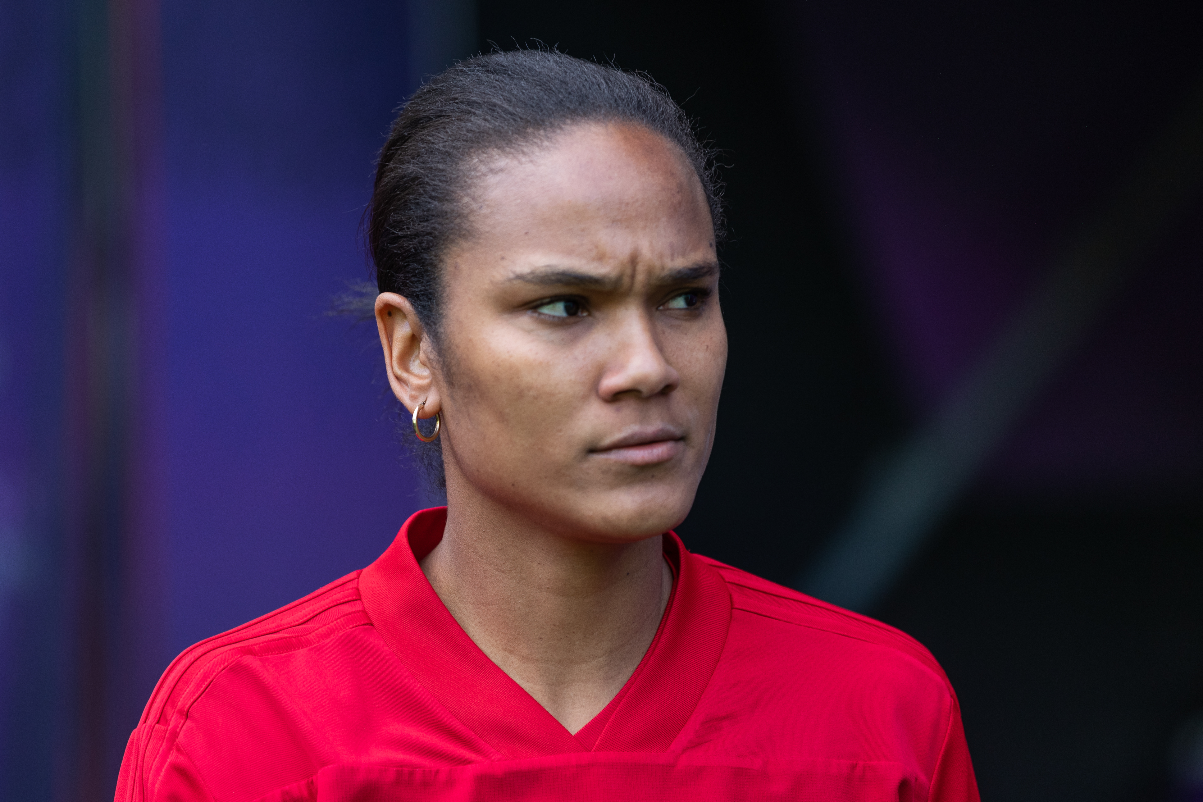 Fußball, Frauen, UEFA Women's Champions League, Olympique Lyonnais - FC Barcelona; Wendie Renard (Olympique Lyon, 3); Porträt, Einzelbild; beim Abschlusstraining